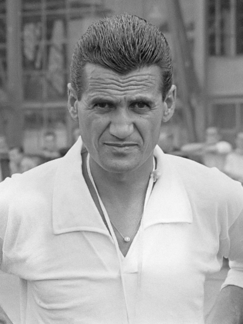 Voetbaltraining Feyenoord begonnen. De nieuwe trainer Hofling 2 augustus 1963